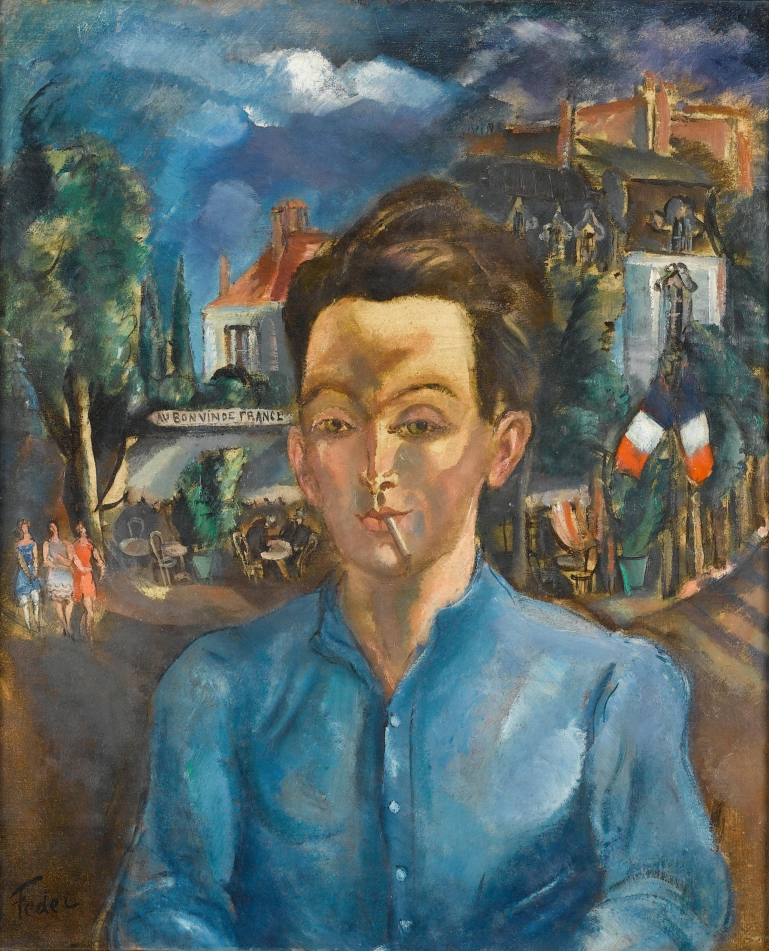 Au bon vin de France